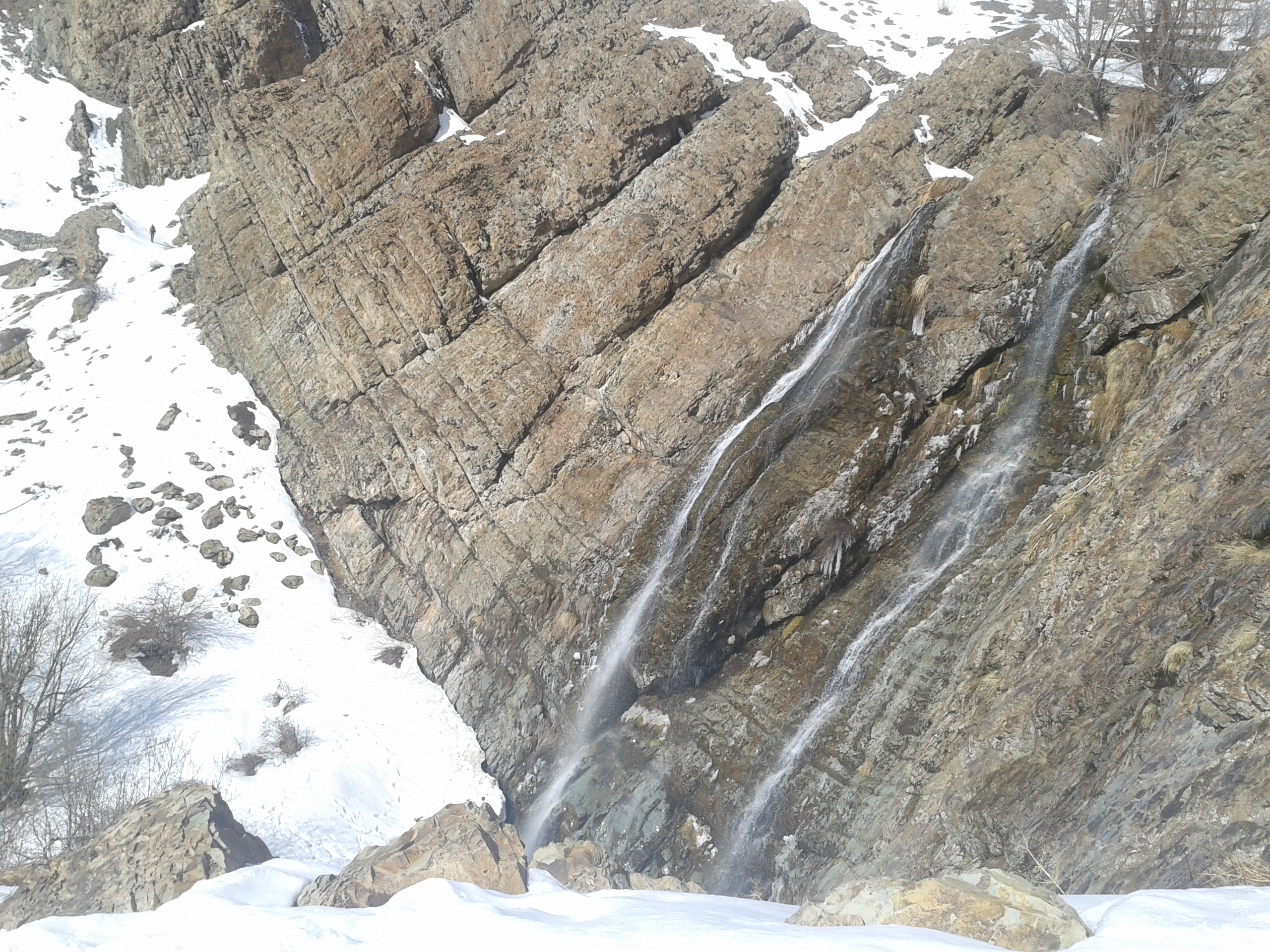 نمای ابشار دو قلو دربند